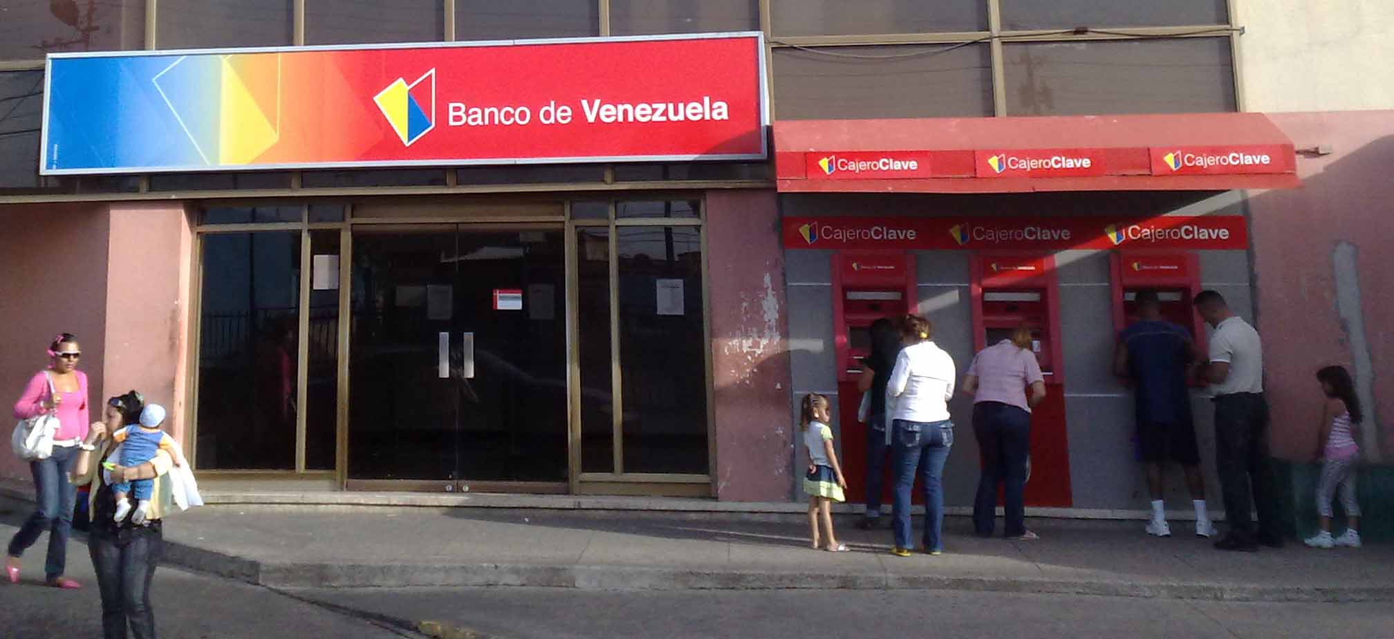 Vista desde la calle Comercio del Banco de Venezuela en Punto Fijo.